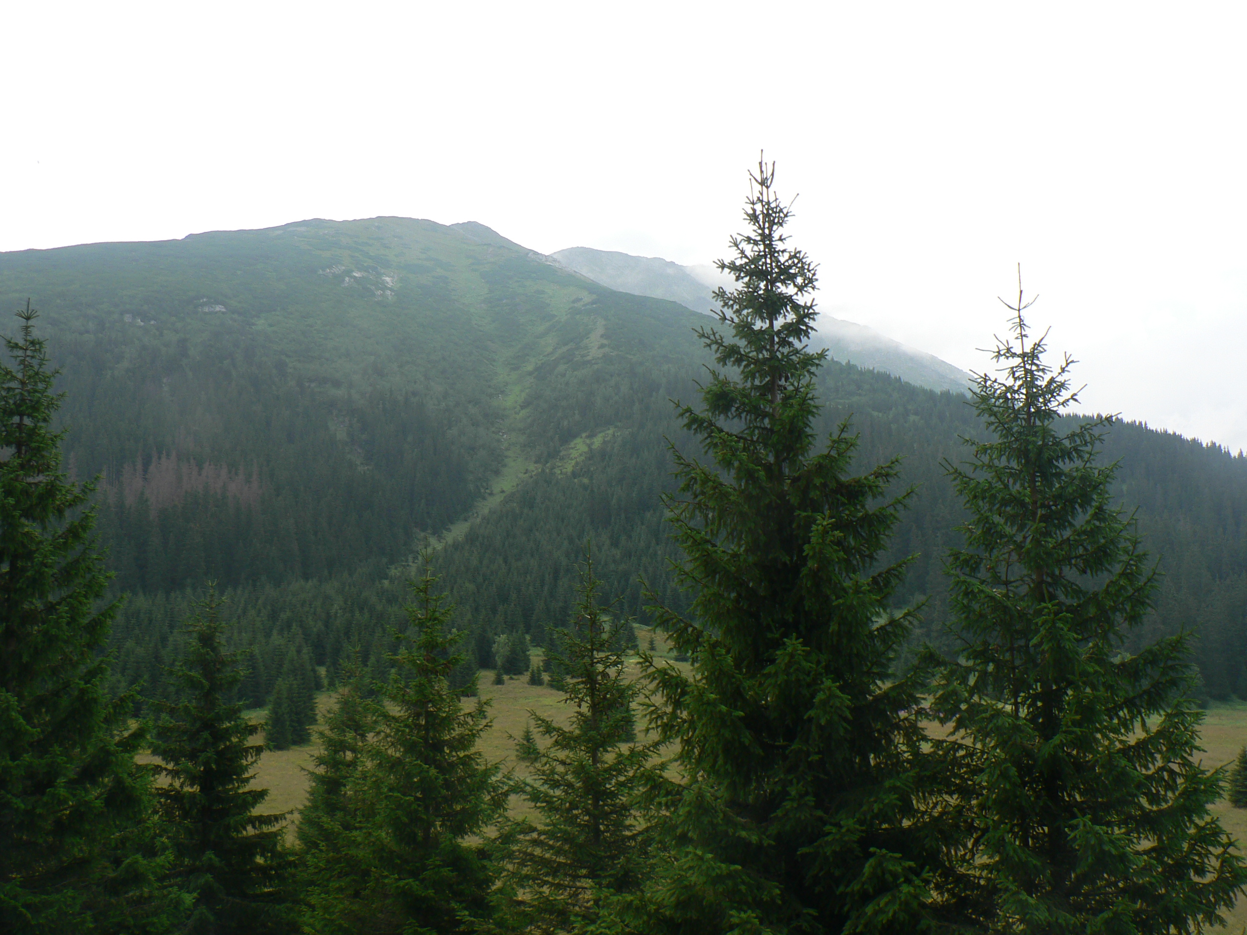 Waksmundzka Polana i Waksmundzki Żleb